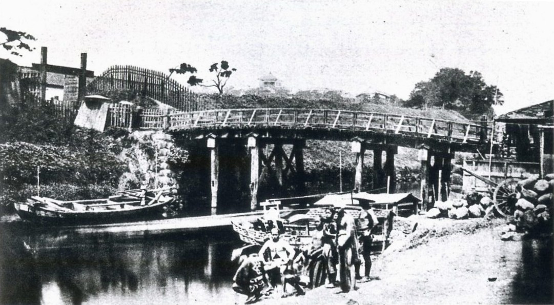 明治初期の昌平橋。左が神田川南岸、手前が北岸。出典はアサヒカメラ。